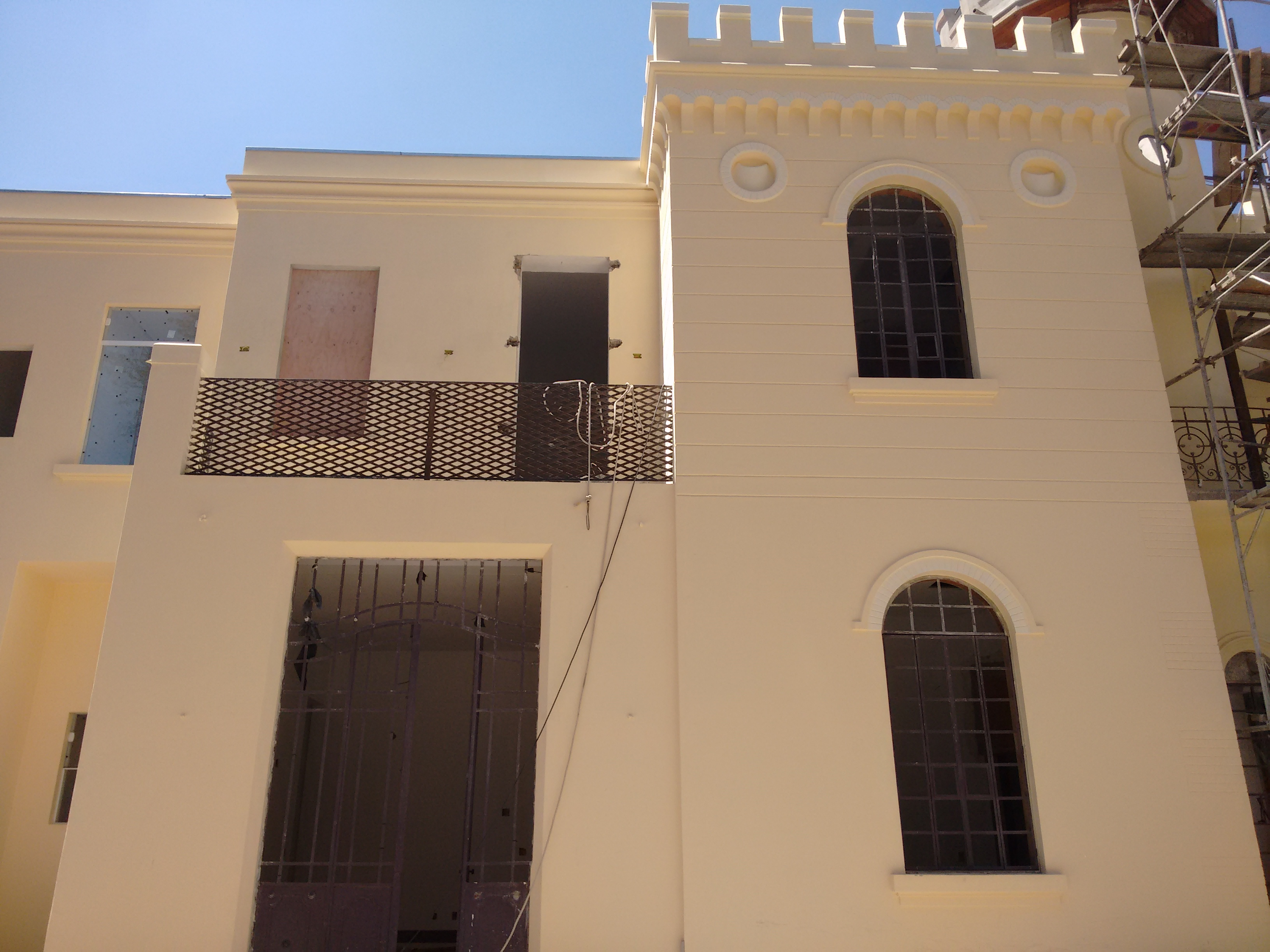 Fachada lateral do Castelinho da Rua Apa, São Paulo (SP), Brasil